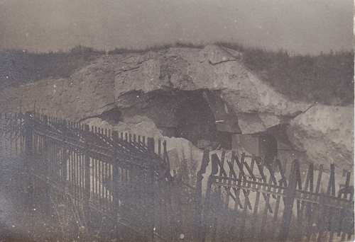 Fort de Manonviller (contrescarpe